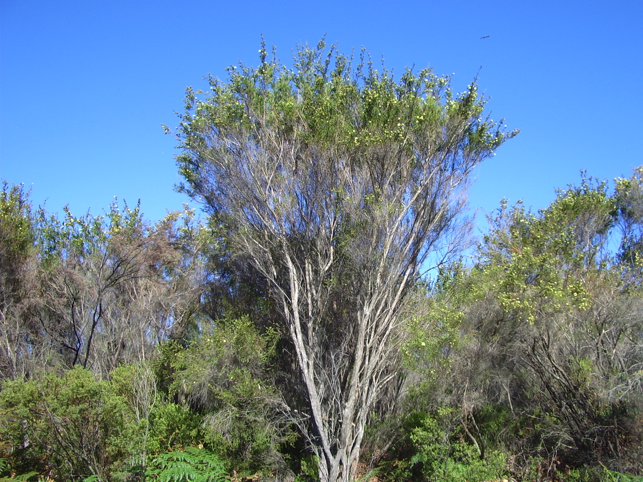 Kunzea ericifolia